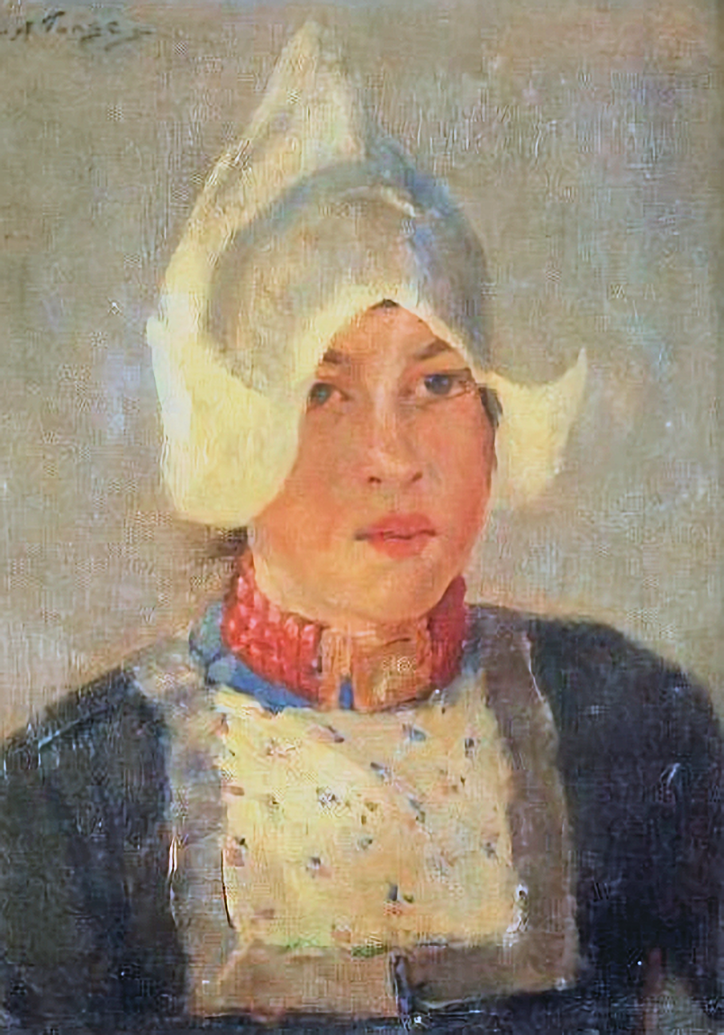 Portret van Hille Butter (1918) door Lammert van der Tonge